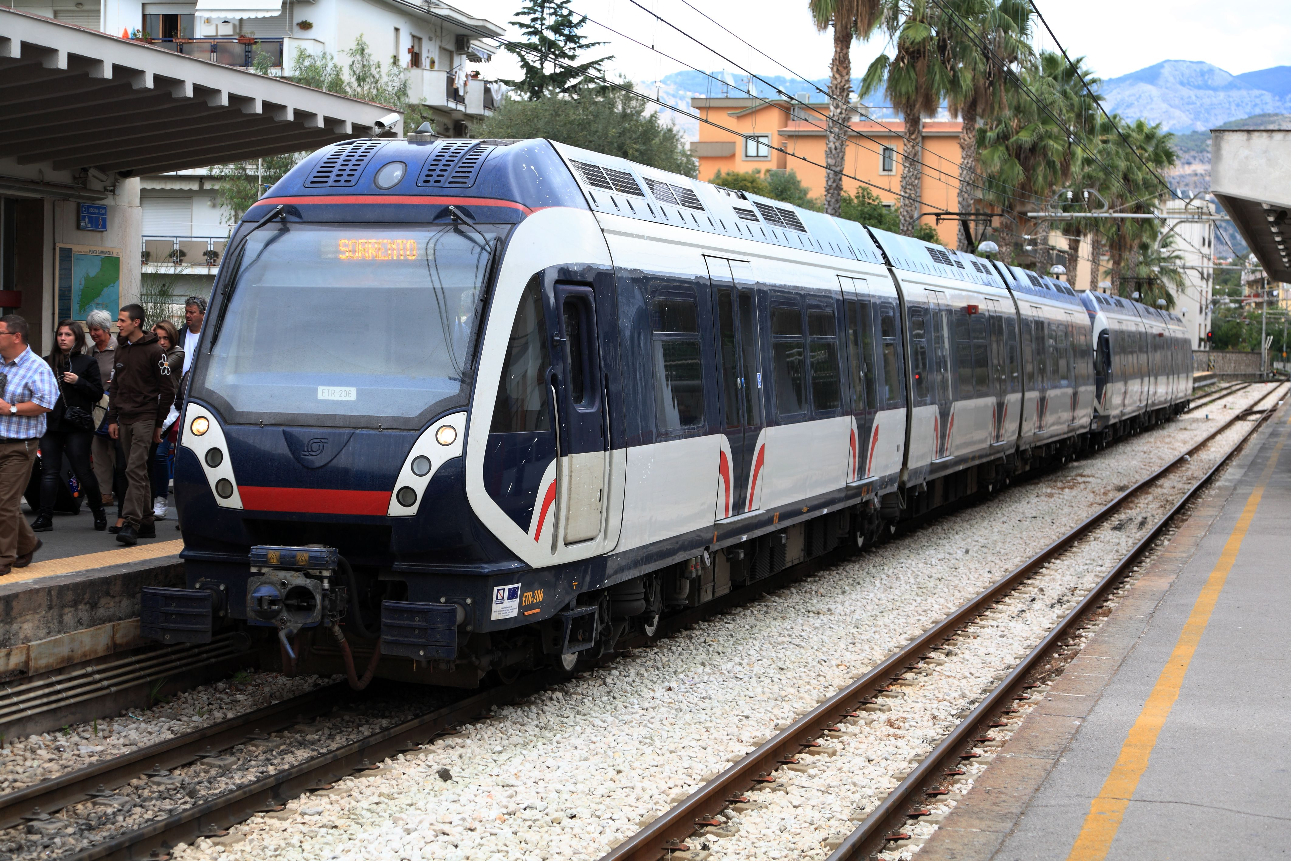 eine »Metrostar«-Doppeleinheit von Napoli Porta Nolana eingefahren am Hausbahnsteig 1